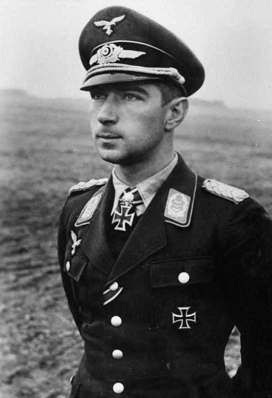 Werner Mölders Scherl: Fliegertod des Oberst Mölders Wenige Tage nach dem Heimgange des Generalobersten Udet hat nun die deutsche Luftwaffe den kühnsten und besten aus den Reihen ihrer Jagdflieger verloren. Der Inspekteur der Jagdfllieger, Oberst Werner Mölders, ist am 22.11.[19]41 auf einem Dienstflug mit einem Kurierflugzeug, das er nicht selbst steuerte, bei Breslau tödlich abgestürzt. Der Sieger in 115 Luftkämpfen fand damit auf eine tragische Weise den Fliegertod. Achtung PK-Aufnahme Bei Abdruck nennen: PK-Aufnahme Kriegsberichter Jütte FZ AV.65764 [Herausgabedatum:] 23.11.[19]41 ADN-Bildarchiv Oberst Werner Mölders, Inspekteur der Jagdflieger, geb. 18.3.1913, gst. 22.11.1941 (gefallen) Aufn.: Jütte 1941 3071-42 [Porträt Werner Mölders] Abgebildete Personen: Mölders, Werner: Oberst, Ritterkreuz (RK), Luftwaffe, Deutschland (GND 11858300X)